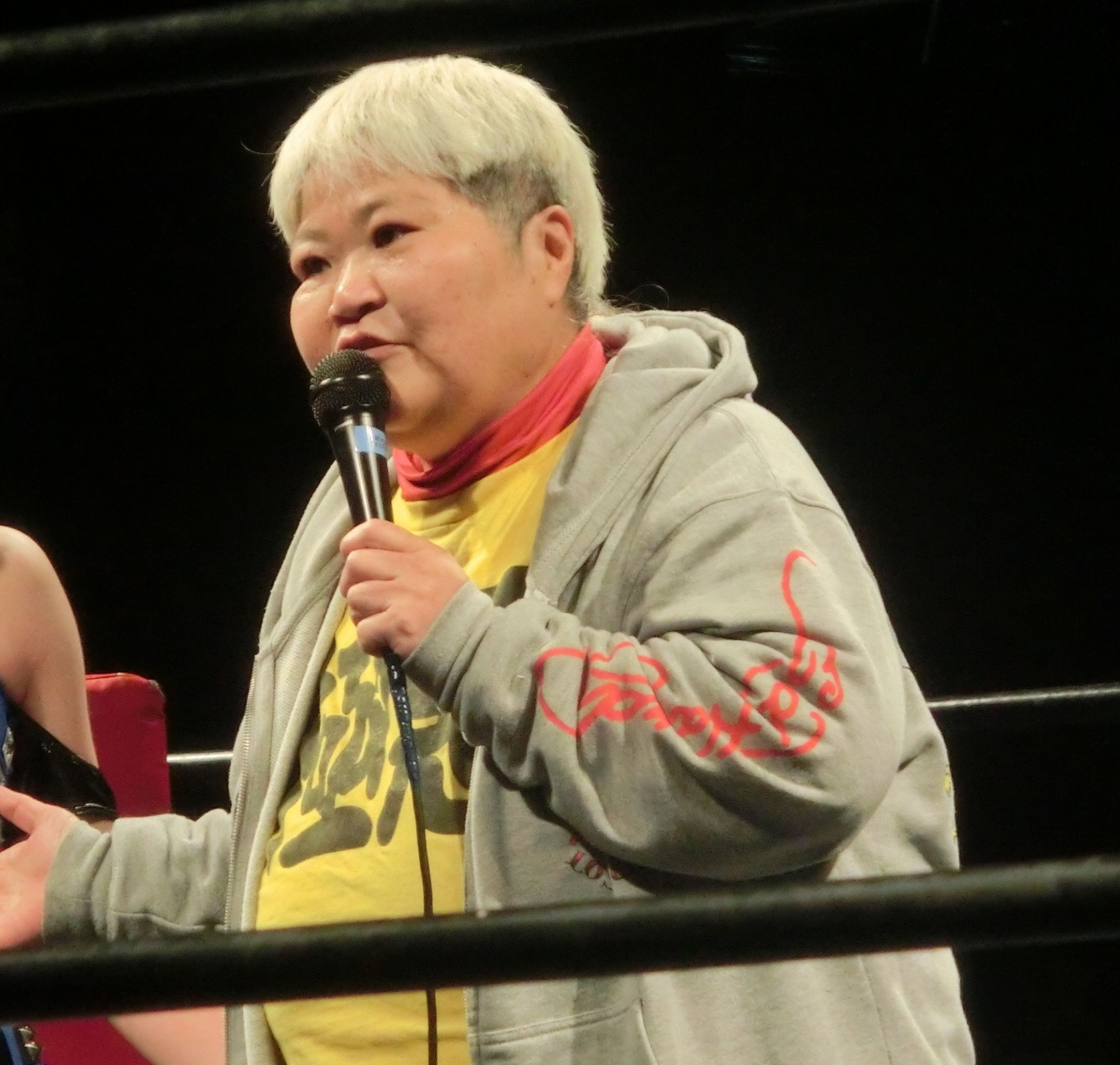 beginning ダンプ松本